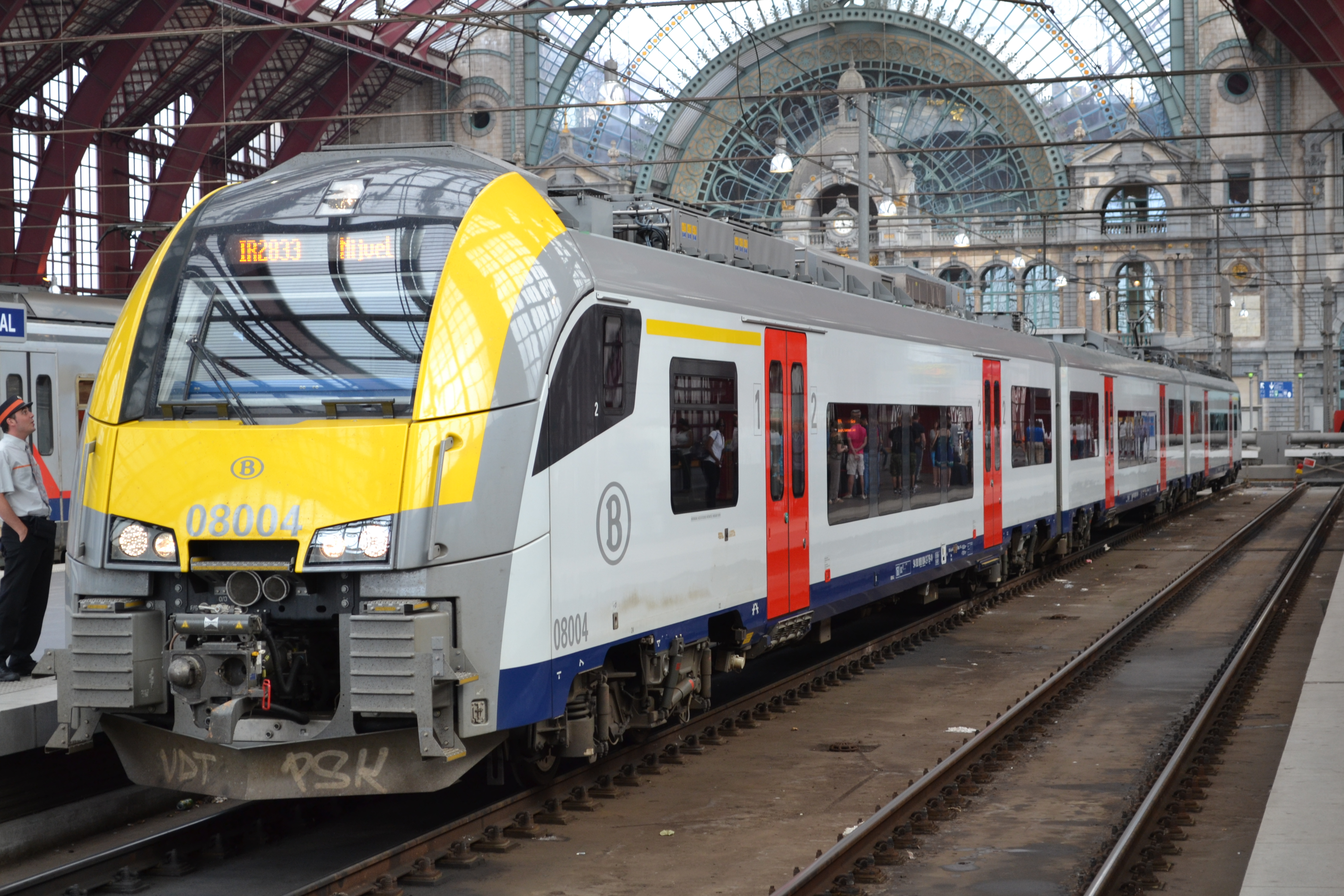 Een Desiro Main Line van de NMBS, de 08004, als IR-trein naar Nivelles, op niveau +1 van station Antwerpen-Centraal.